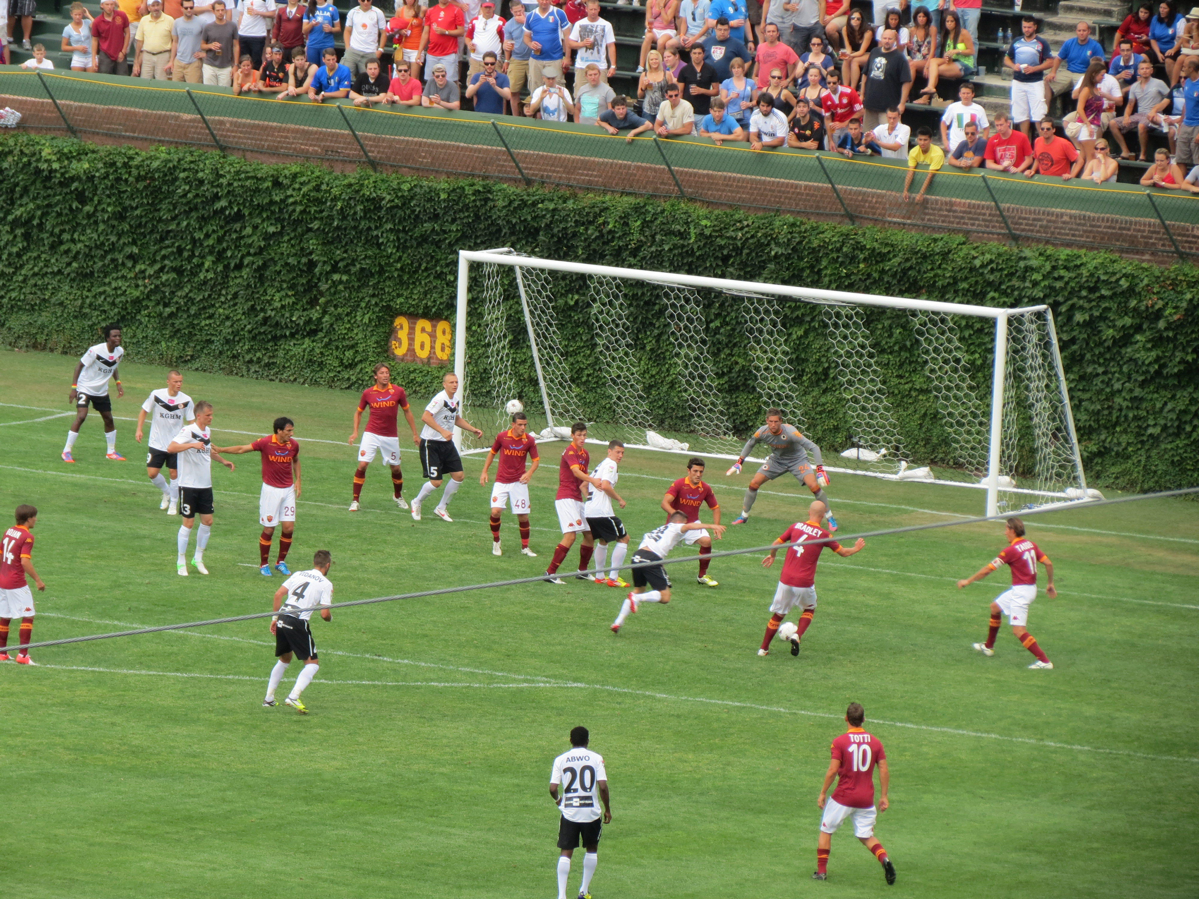 A.S. Roma defending against Zagłębie Lubin in Wrigley Field.